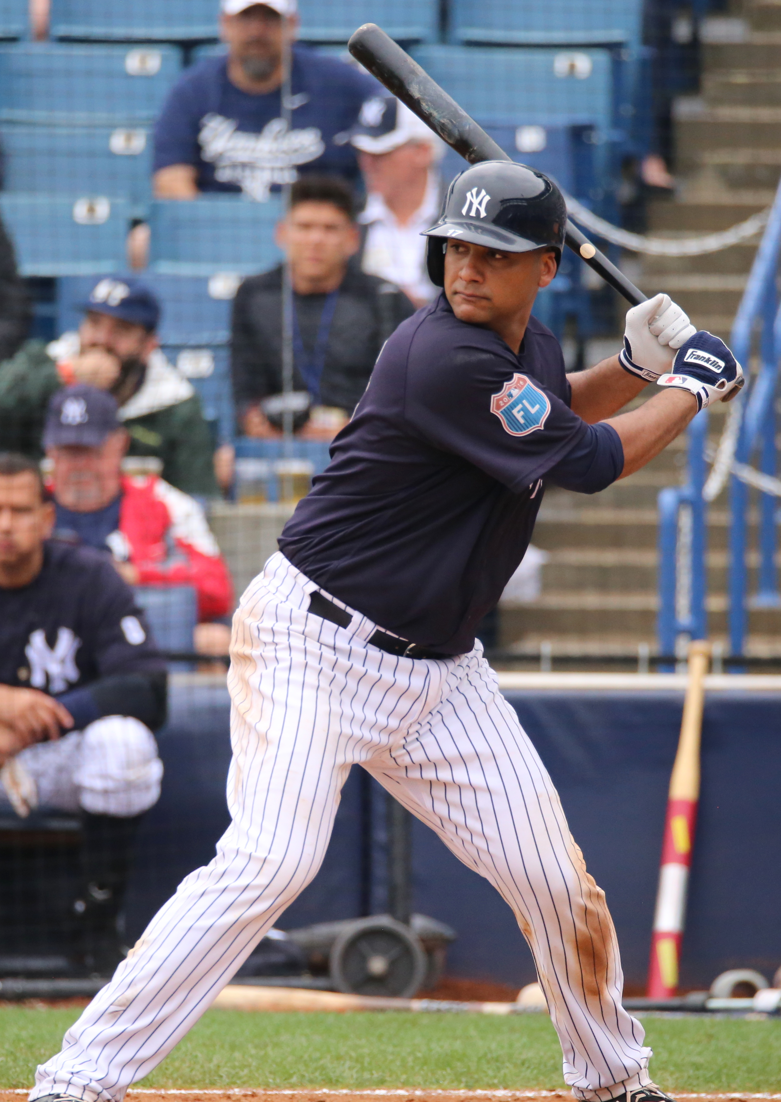 Carlos Corporán